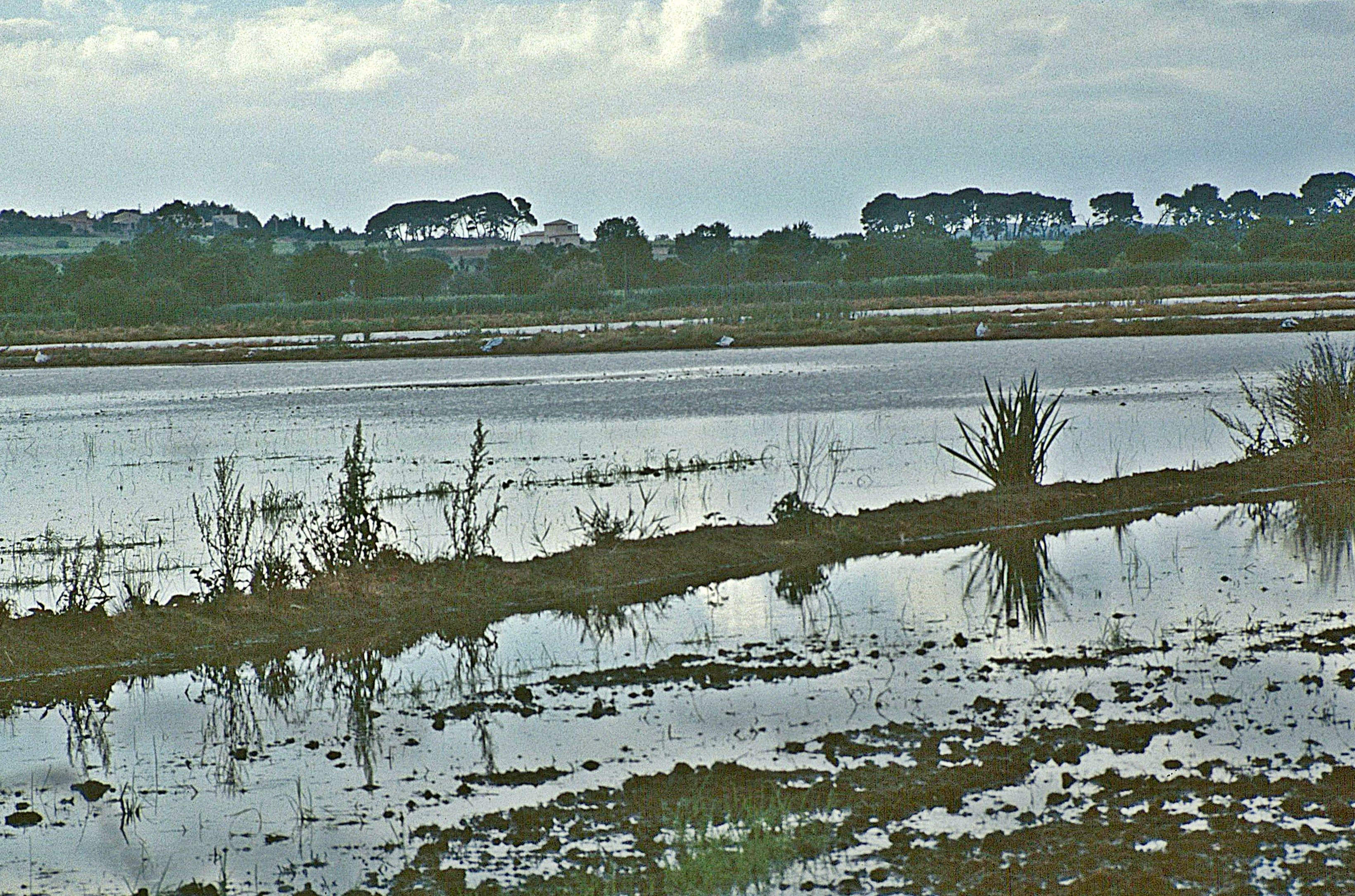 Naturreservat Haute Roque